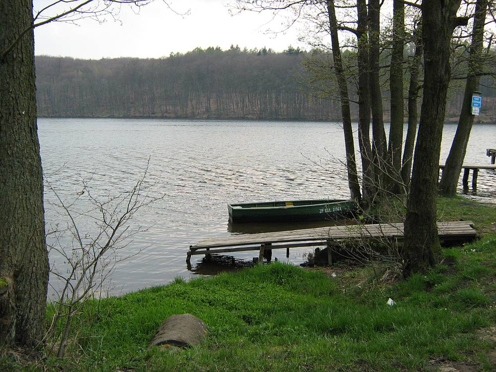 Jezioro Kamienica.